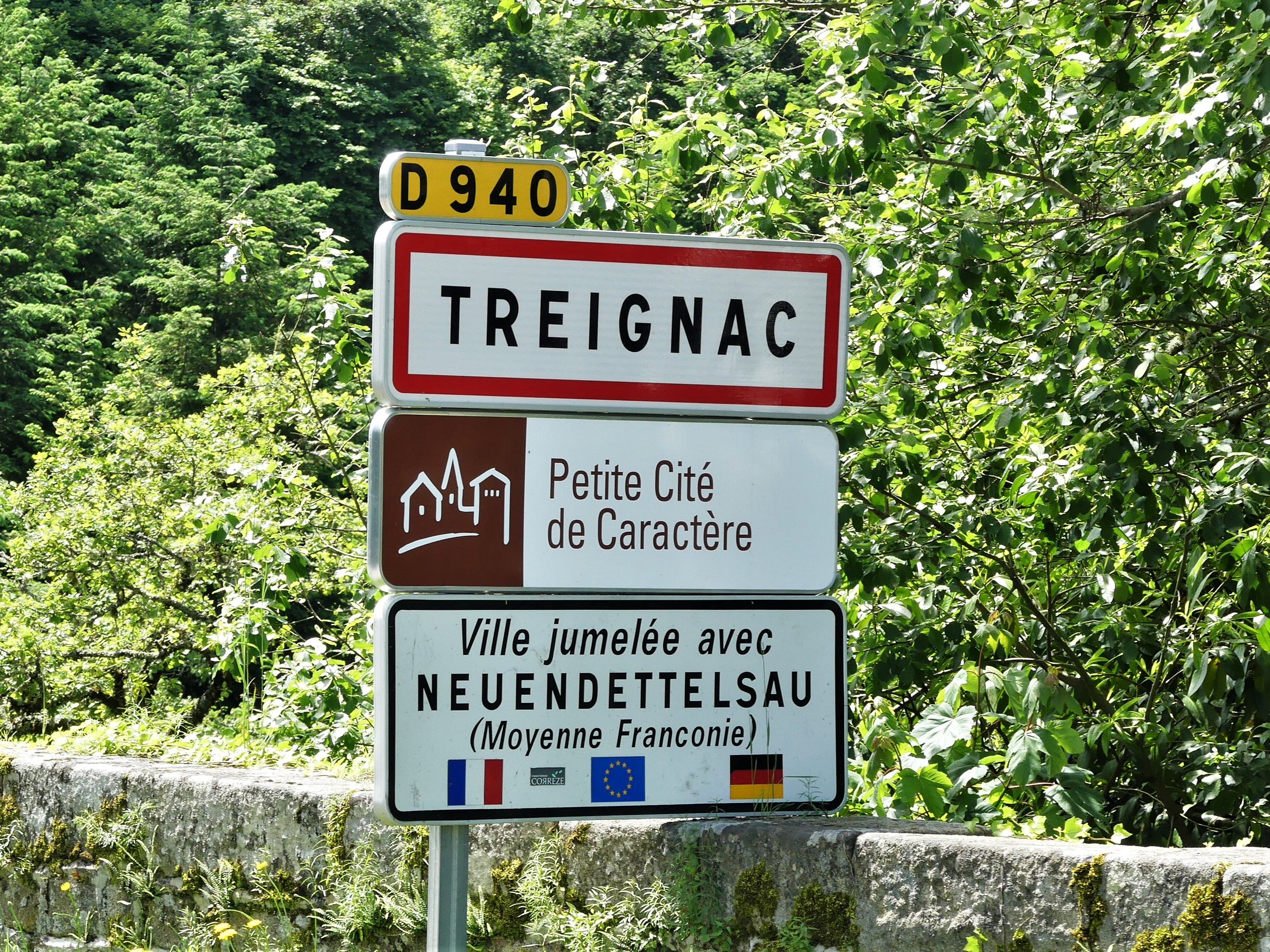 Panneau de jumelage, Treignac, Corrèze, France.